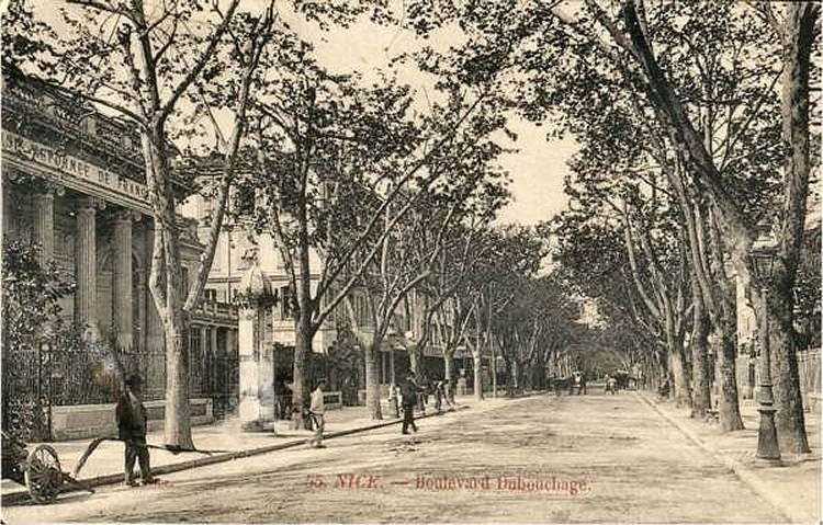 Le boulevard Dubouchage au niveau de l'actuelle bibliothéque (circa 1910)